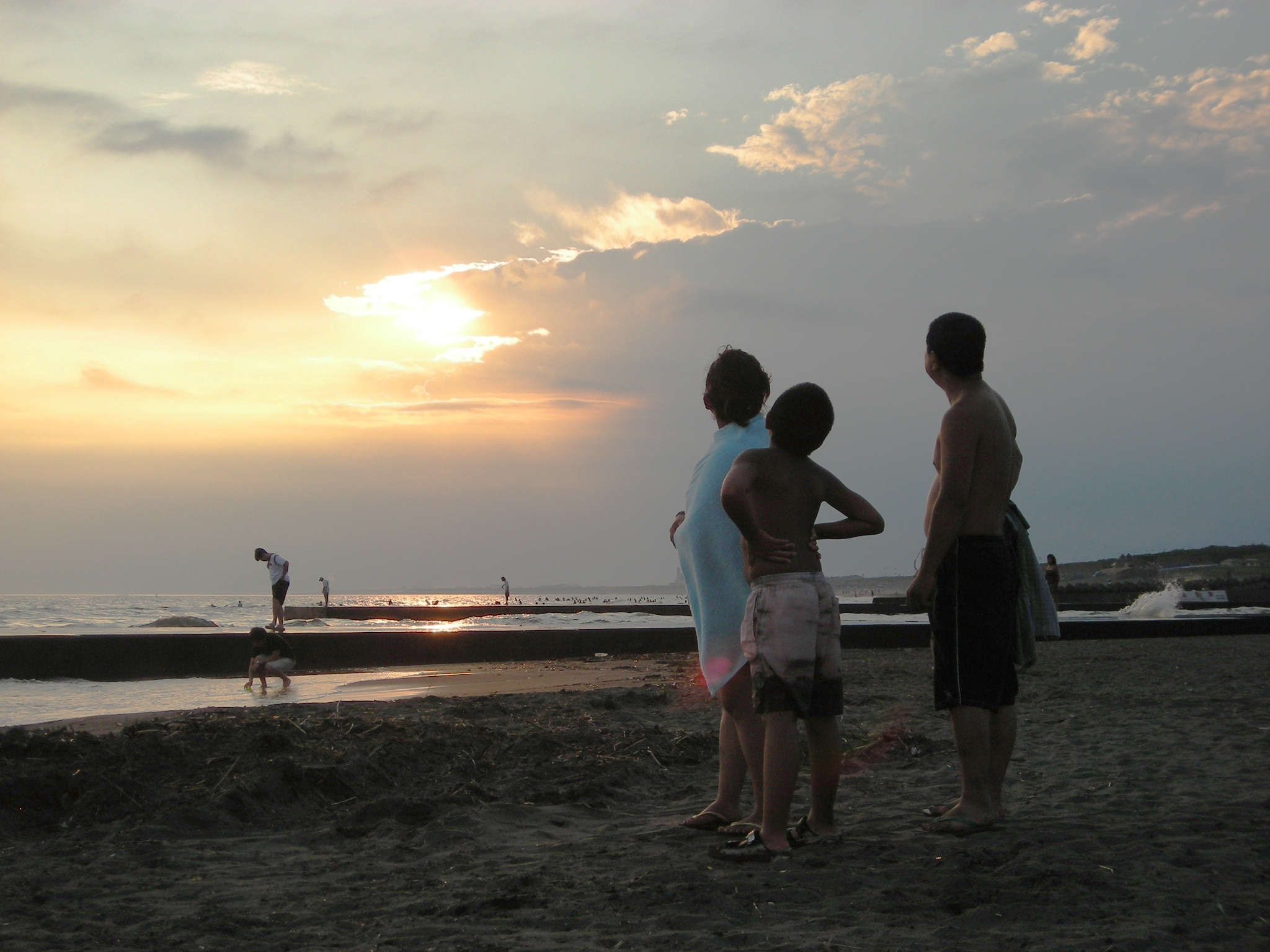 鵠沼海岸の夕暮れ。